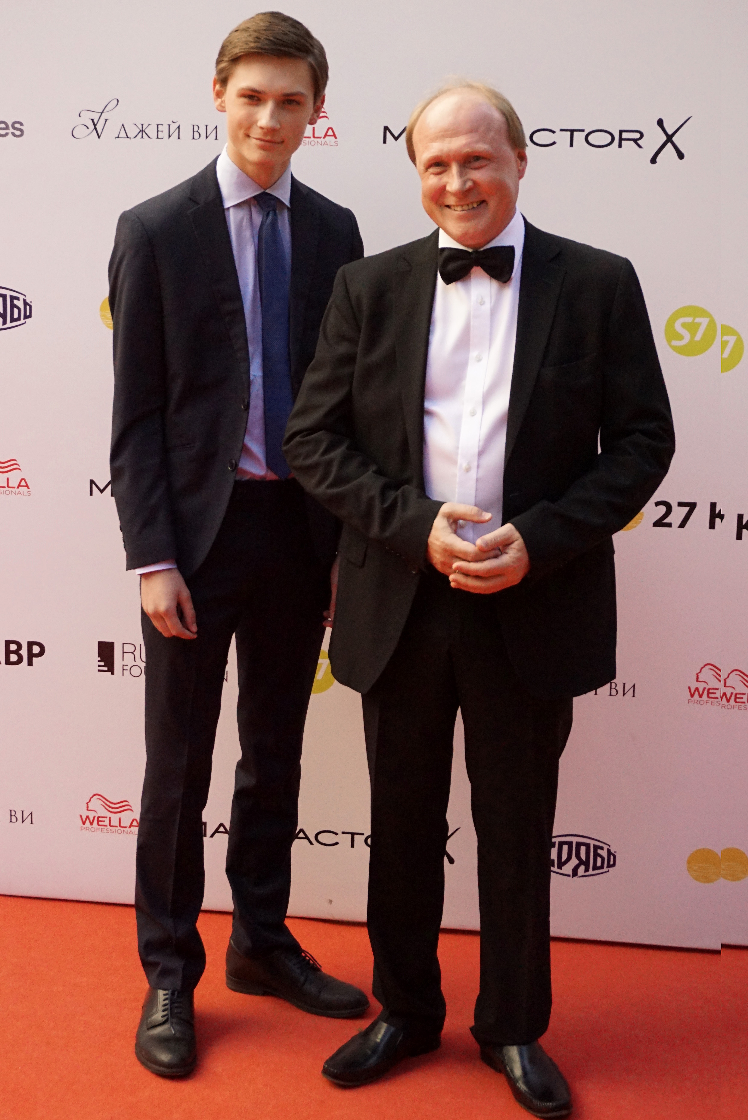 Советник президента РФ по культуре Владимир Толстой с сыном на церемонии закрытия 27-го Открытого российского кинофестиваля Кинотавр в Сочи.